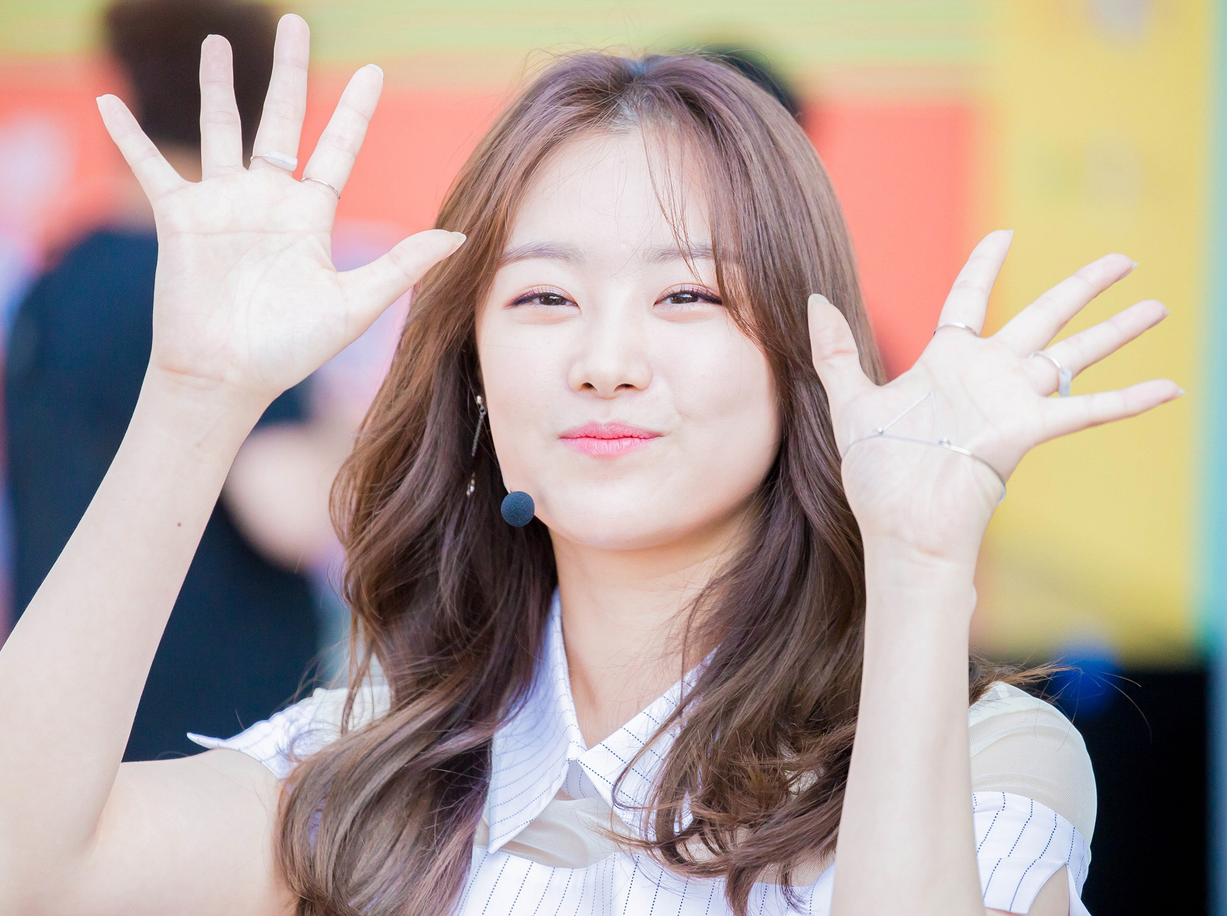 160528 U클린콘서트 시크릿 송지은